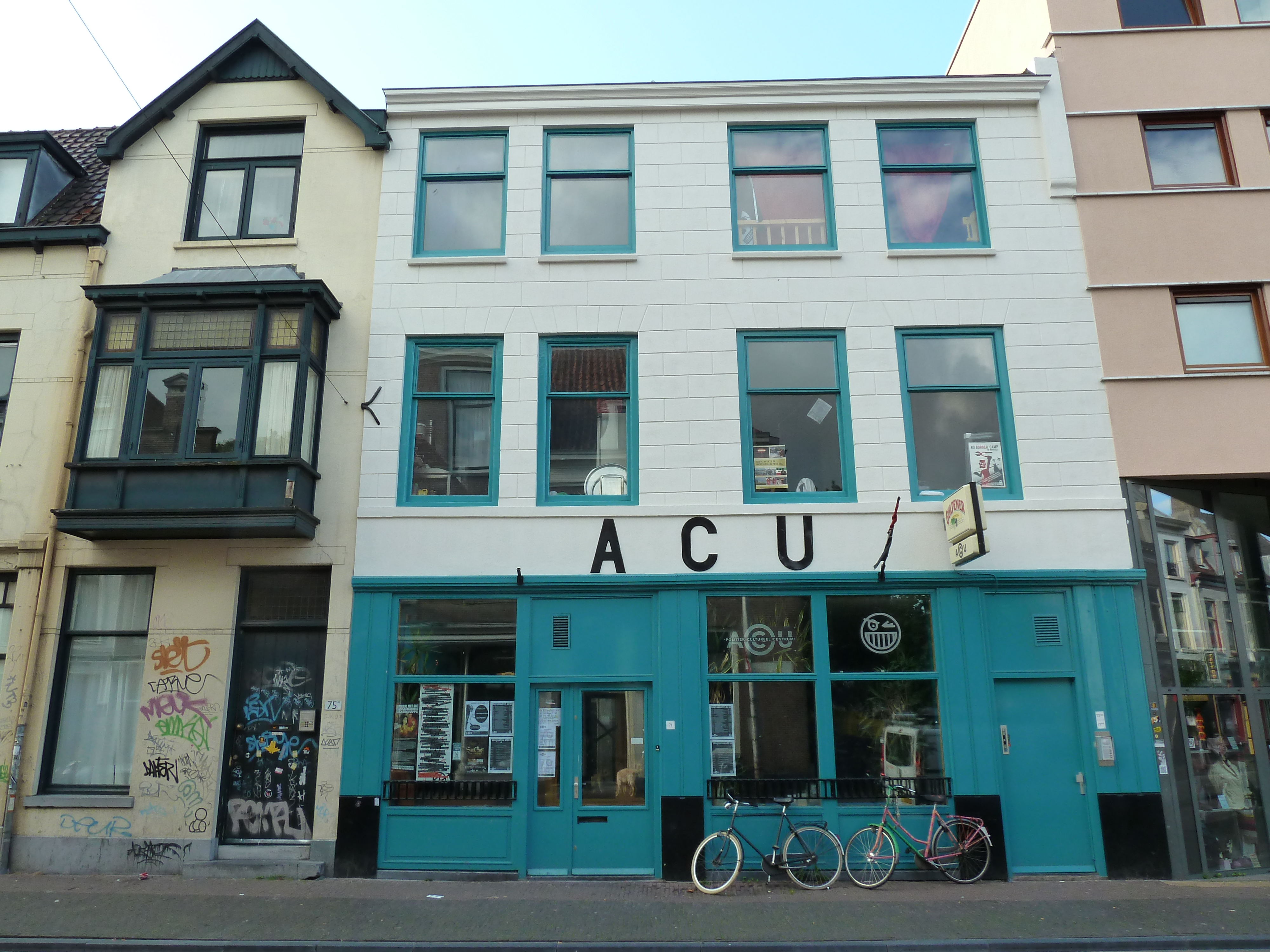 ACU, Utrecht, NL.